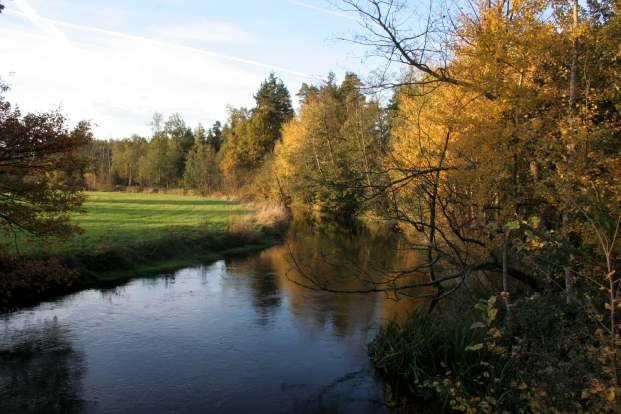 Örtzetal in Eversen